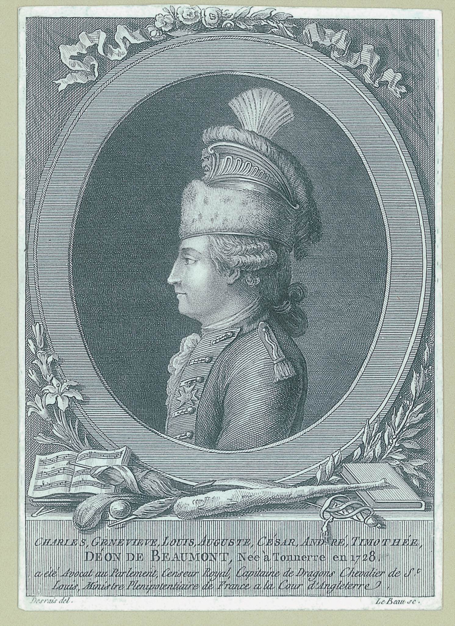 Le_chevalier_d’Éon_(1728-1810)